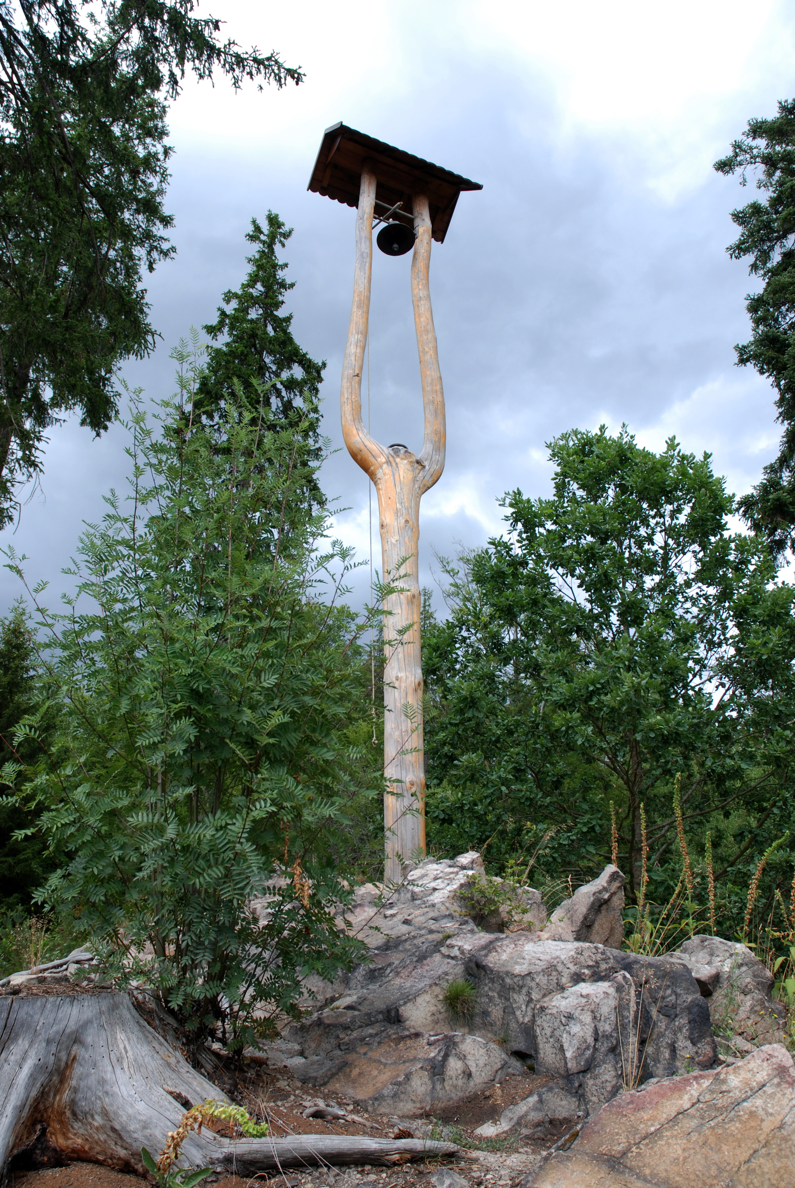 Zvonička Na Jungmance v karlovarských lázeňských lesích při Jungmannově cestě u Jungmannova altánu